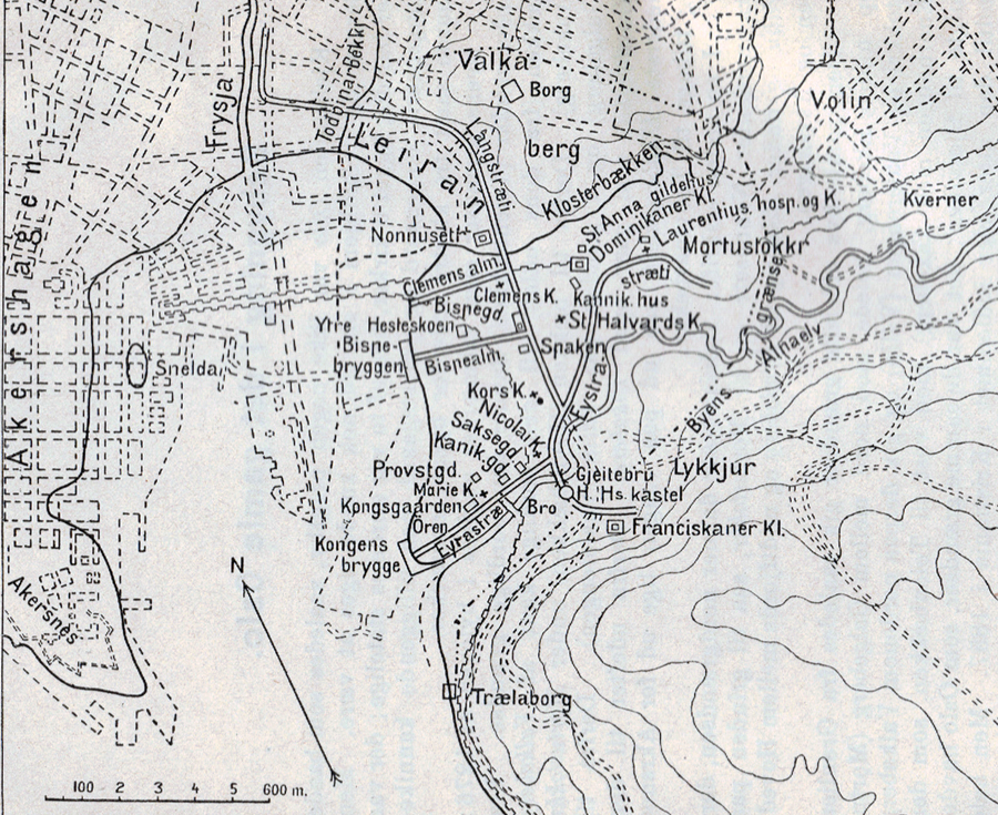 Middelalderens Oslo tegnet inn på et kart over Kristiania fra 1917.